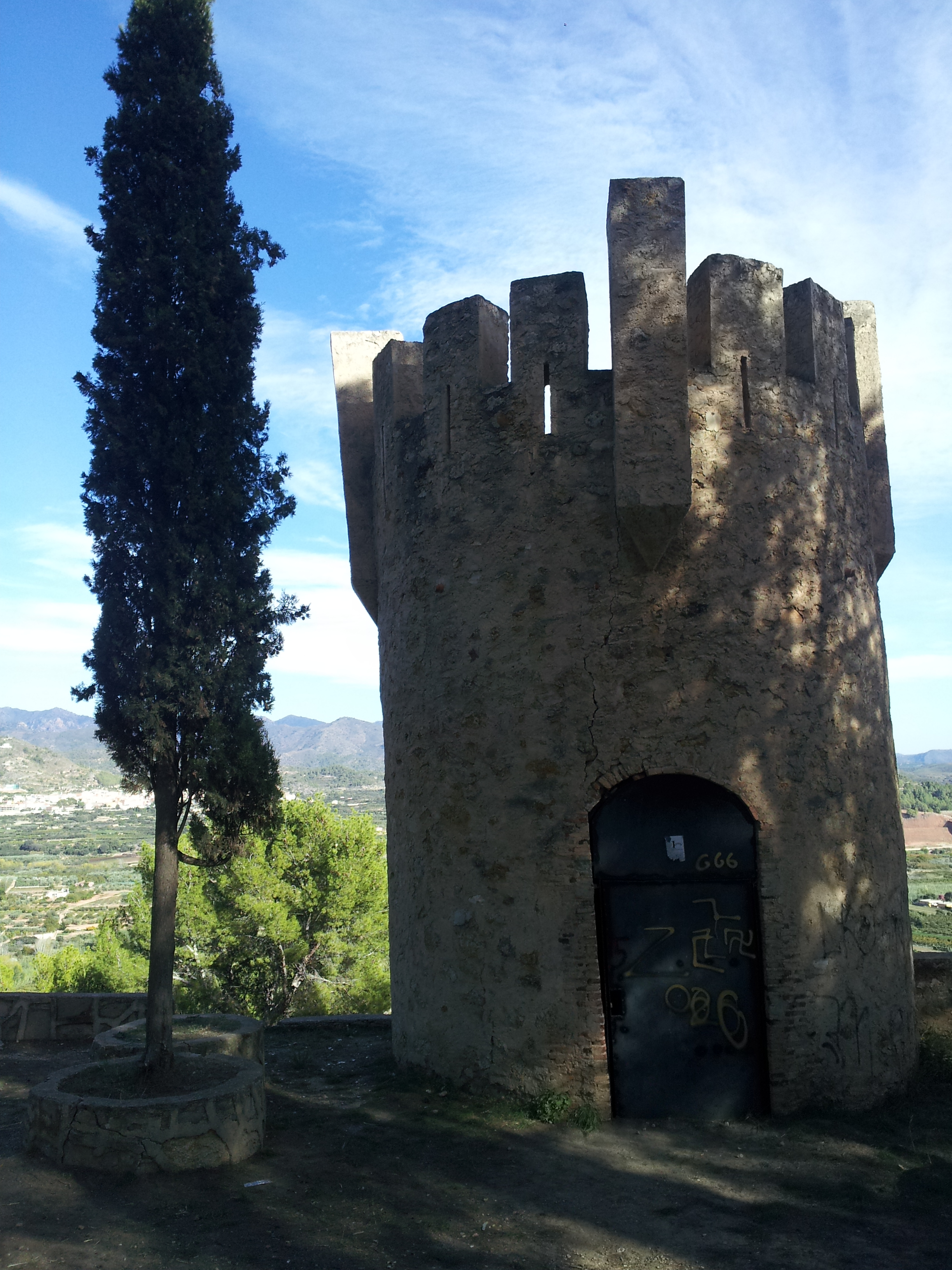 Castell de l'Estrela o Sopeña.